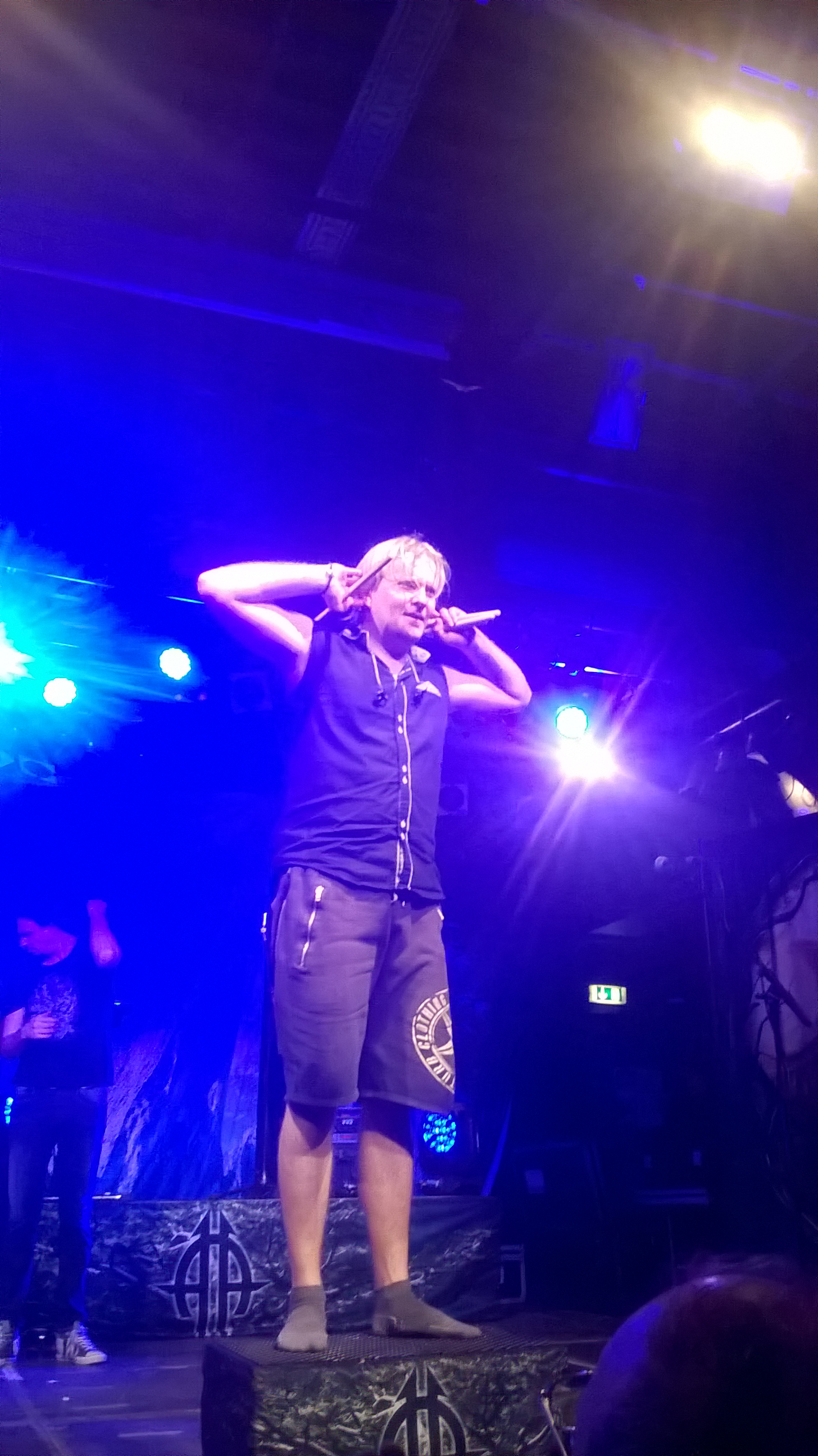 Tommy Portimo beim Abschied in München